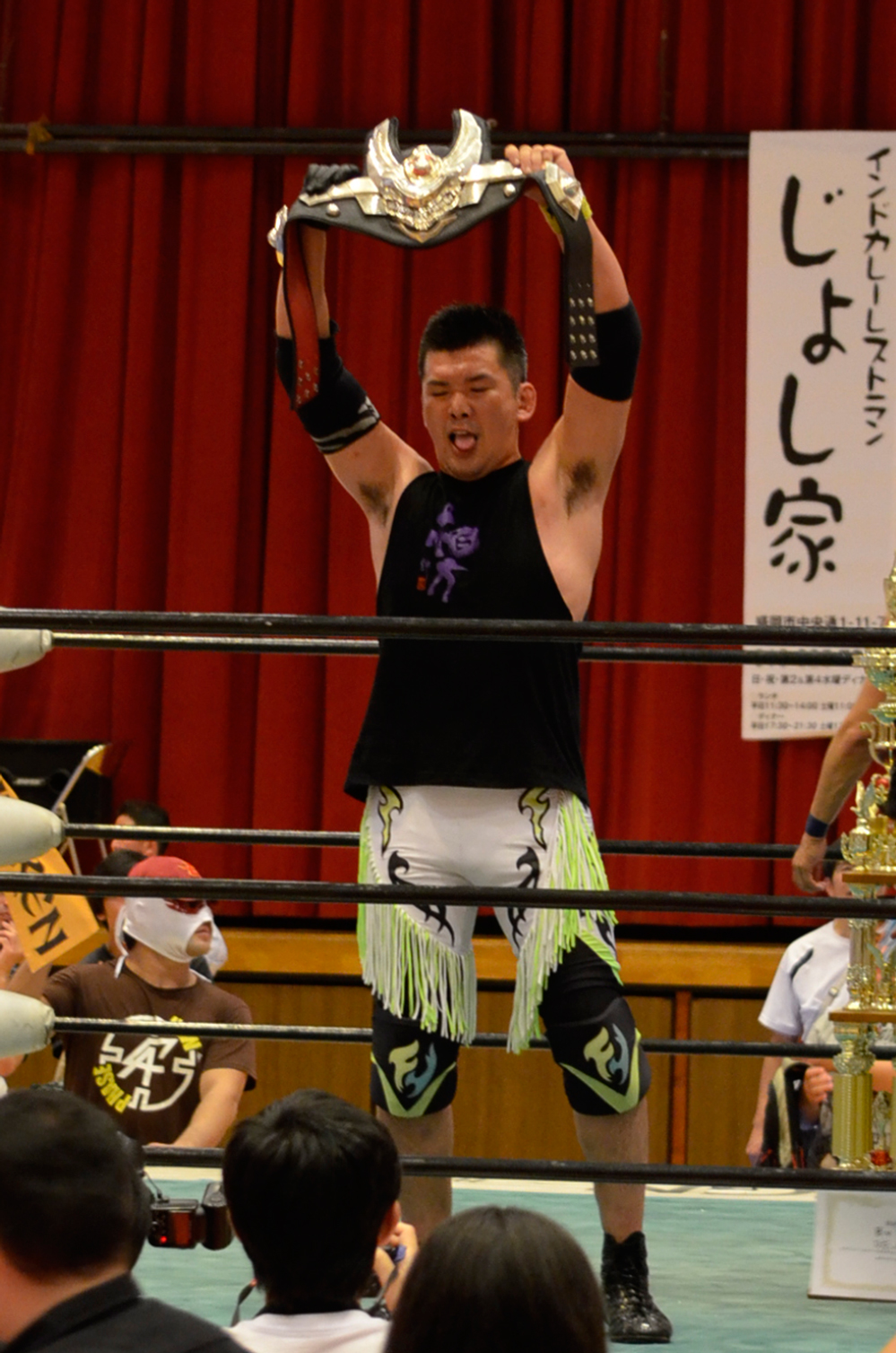 藤田ミノル